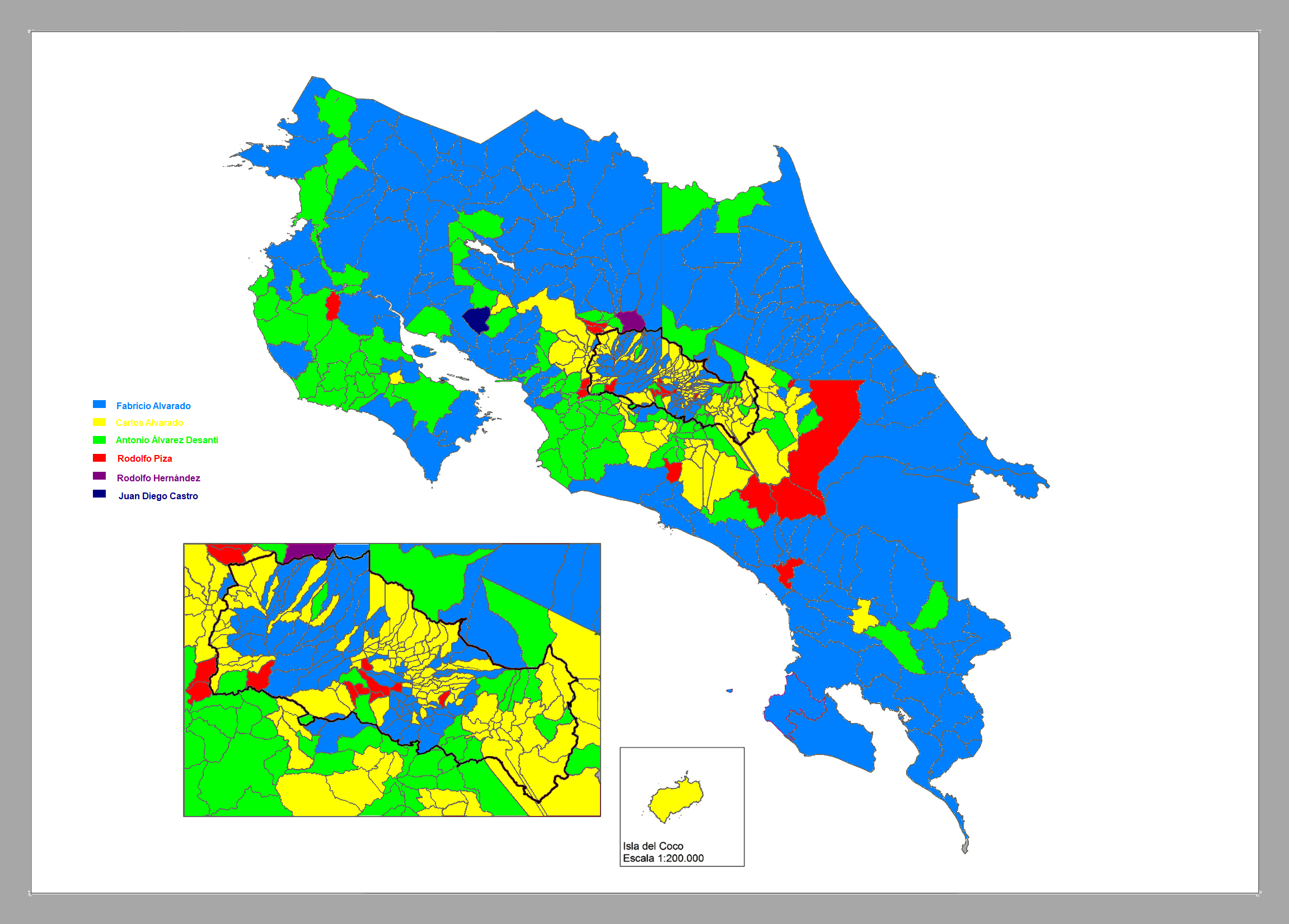 Resultados por distrito de la primera ronda de las elecciones presidenciales de Costa Rica. 4 de febrero